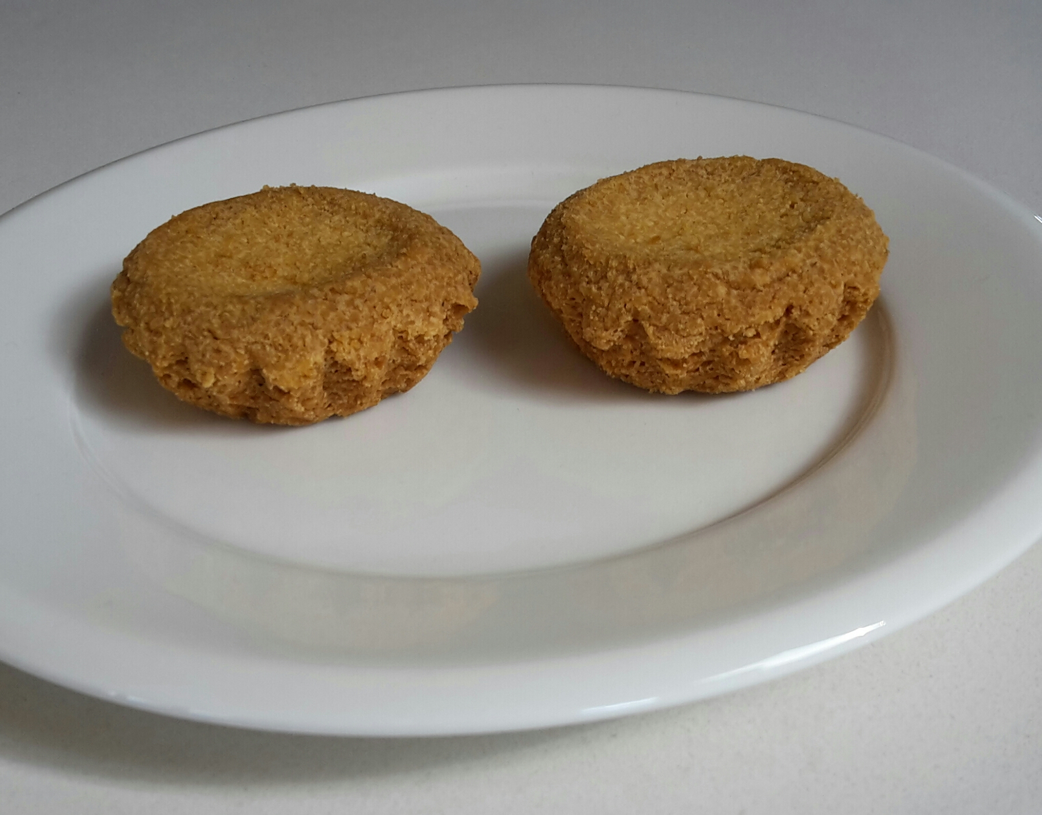 Hernhutter koekjes, een Zeister specialiteit